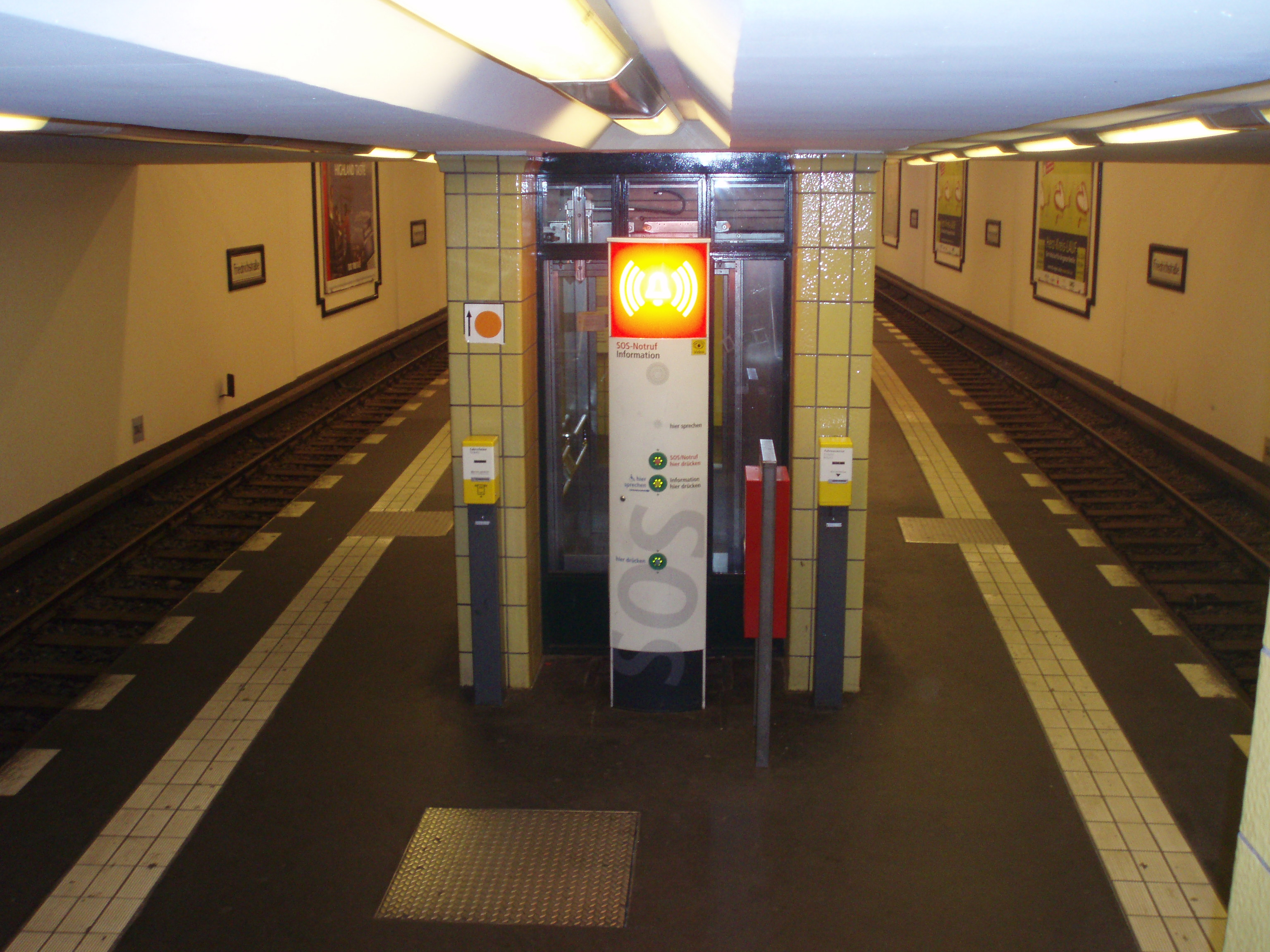 U-Bahn in Berlin